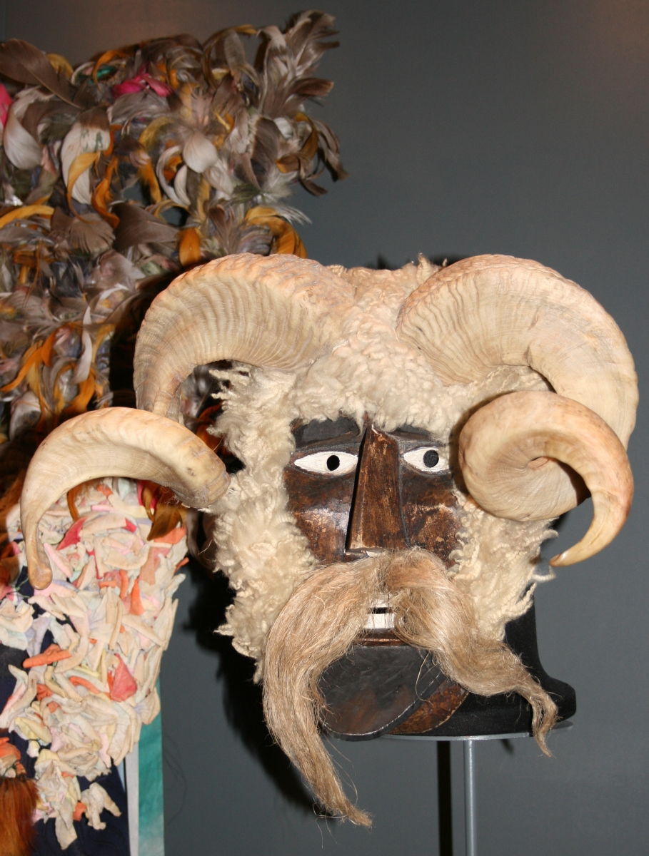 snimljeno tijekom Noći muzeja u Etnografskom muzeju u Zagrebu